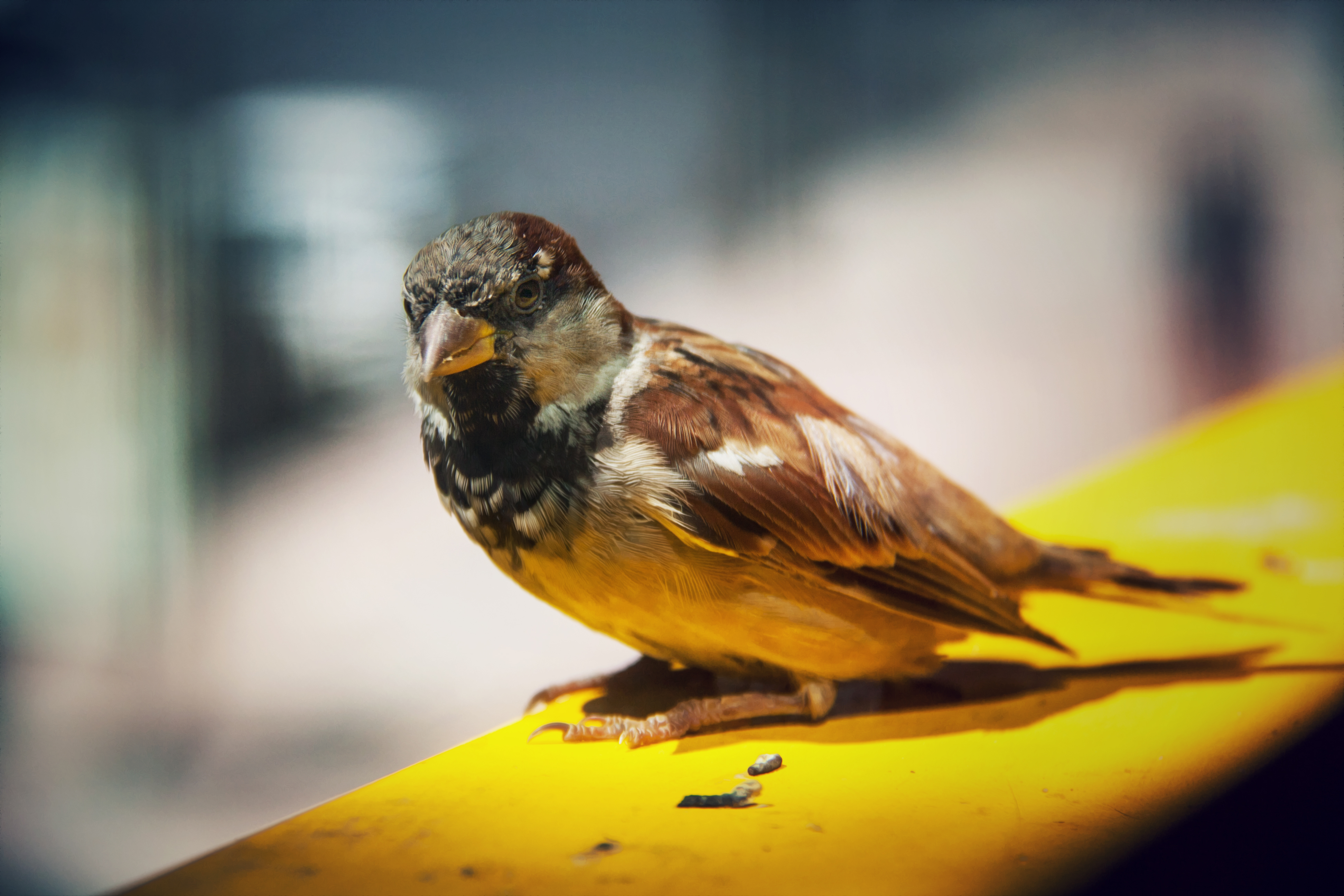 Madrid, España